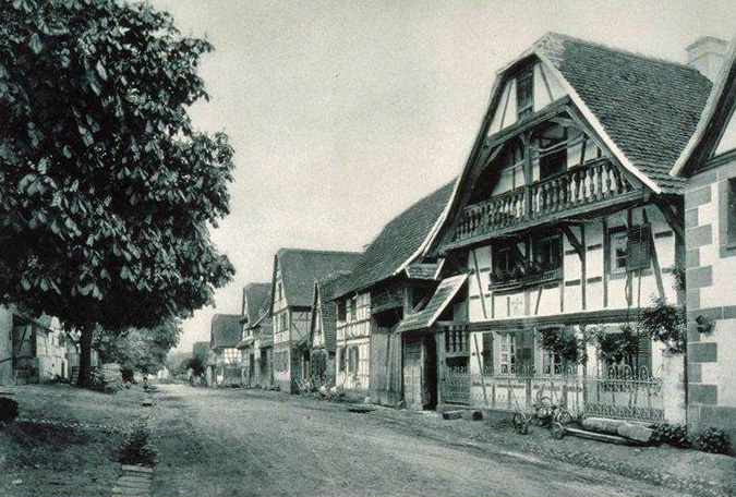 Issenhausen. Société du Musée Alsacien (Strasbourg). Bibliothèque nationale et universitaire de Strasbourg